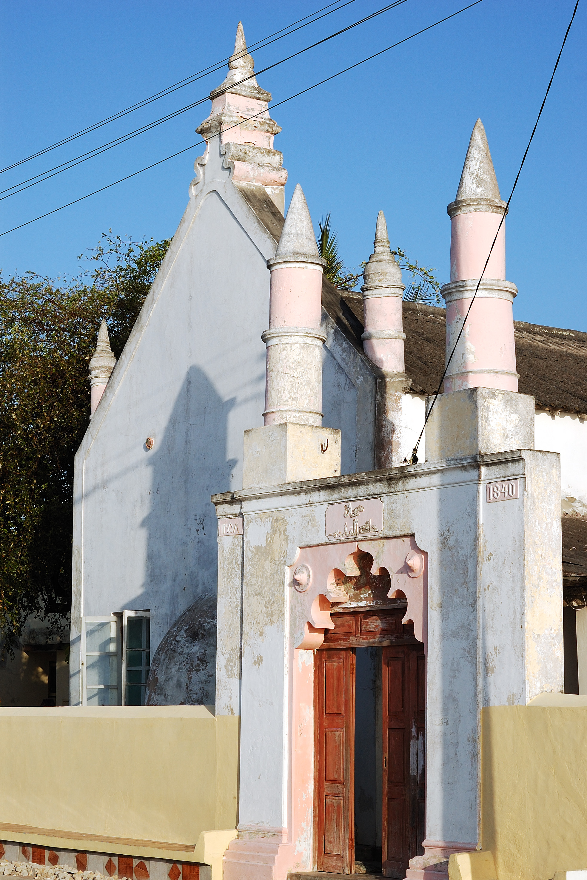 Inhambane, Moçambique [2009]